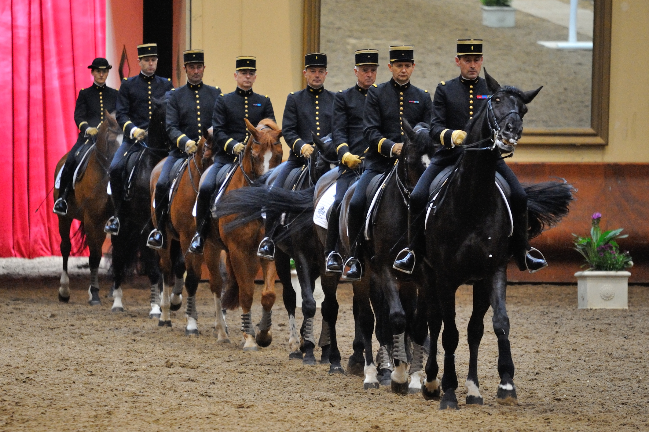 Présentation publique du Cadre noir, École nationale d'équitation, Saumur (description à compléter)